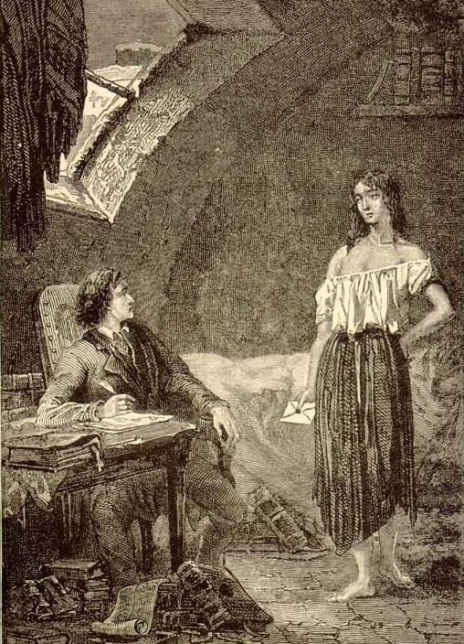 Éponine remet la lettre à Marius.